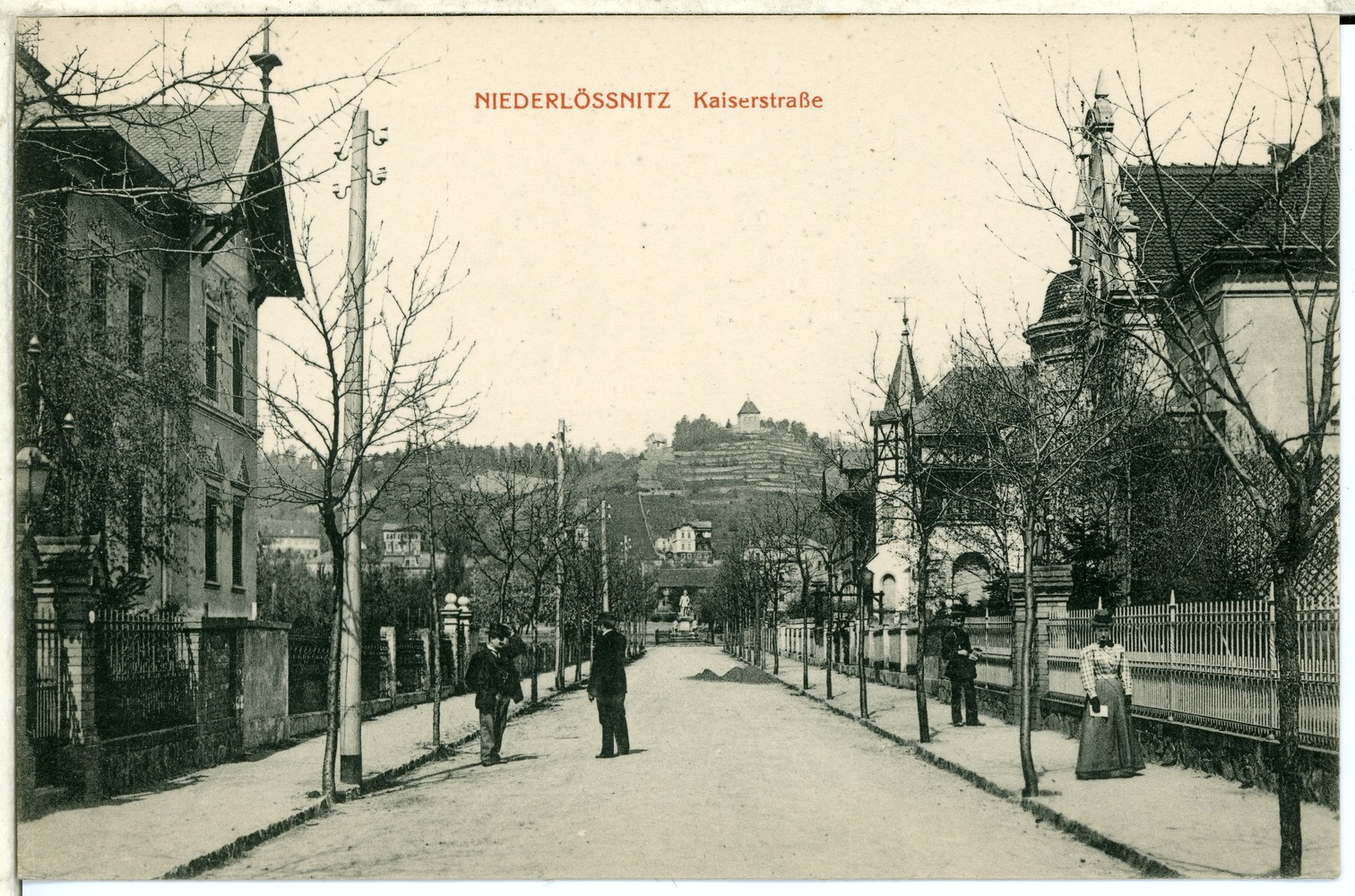 Niederlößnitz; Kaiserstraße This postcard is from publisher Brück & Sohn in Meißen ( postcard has a unique number 00983 and is available in a higher resolution at the publisher. This images was uploaded in a cooperation project between Wikipedians and the publisher.